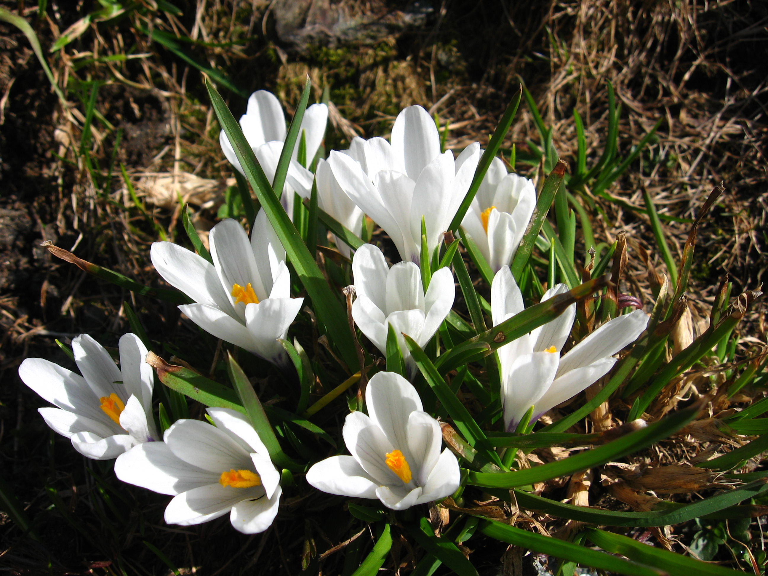 Crocus